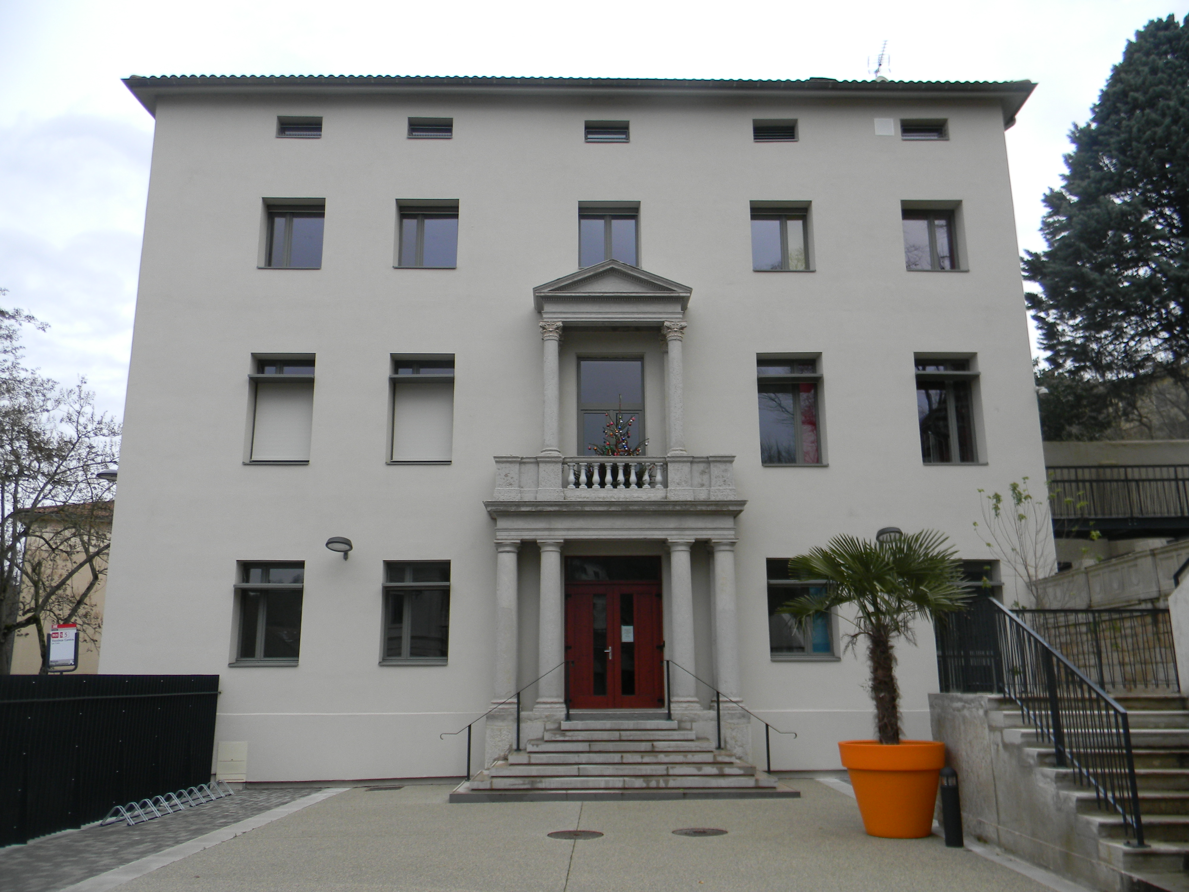 La maison des association de Caluire-et-Cuire.